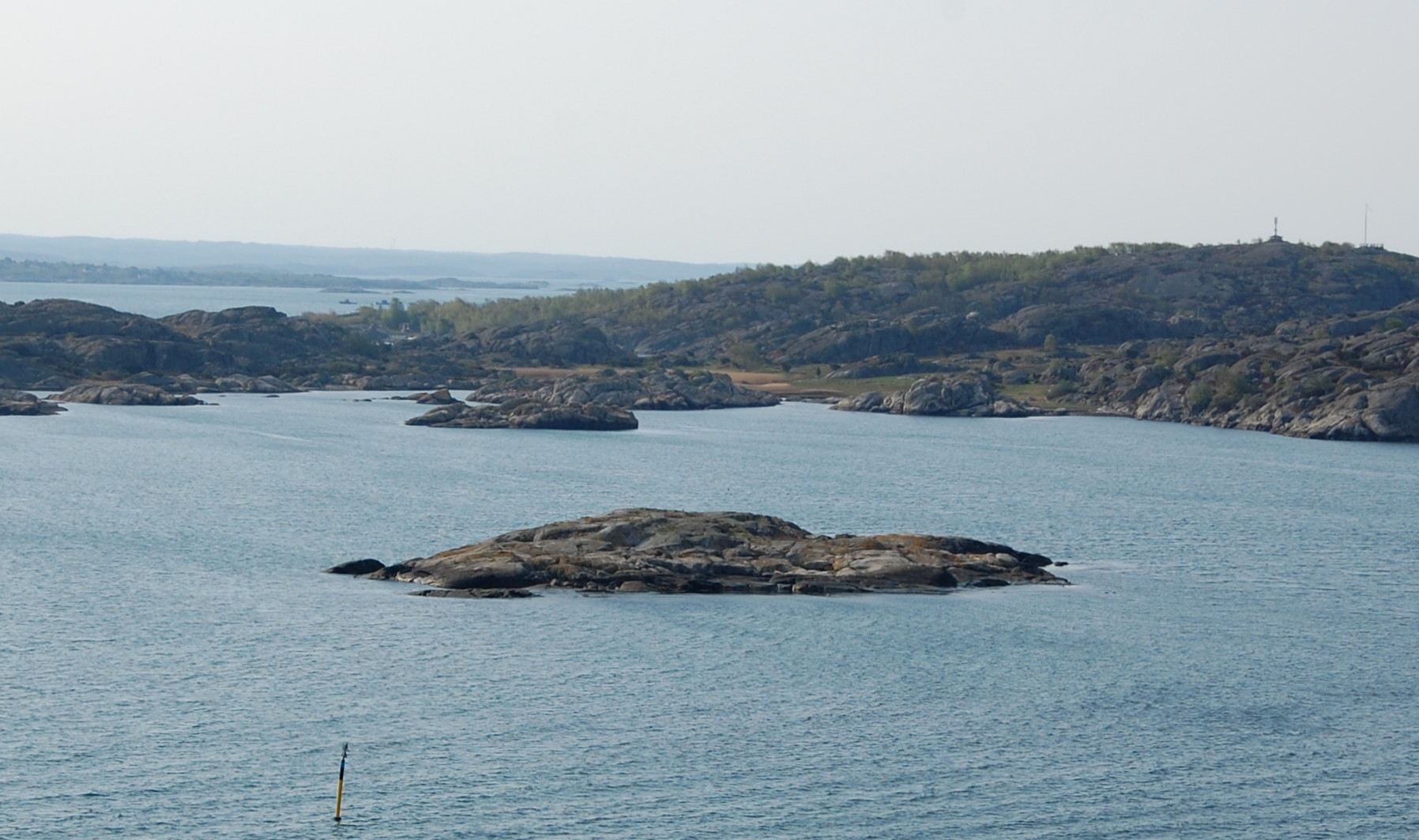 Insel im Schärengarten vor Göteborg